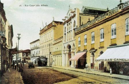 Rua Conselheiro João Alfredo, durante a Belle Époque em Belém do Pará.